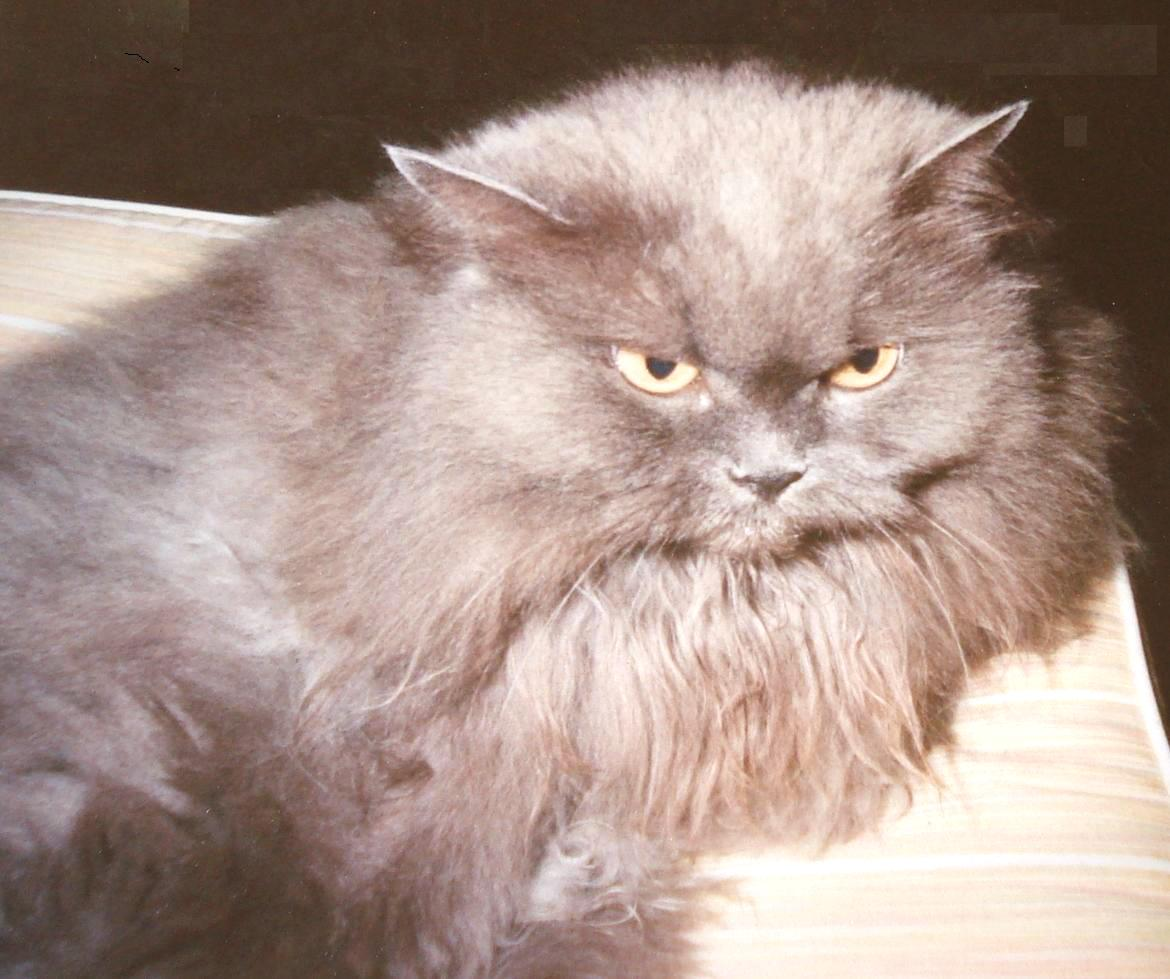 Bild einer blauen Perserkatze